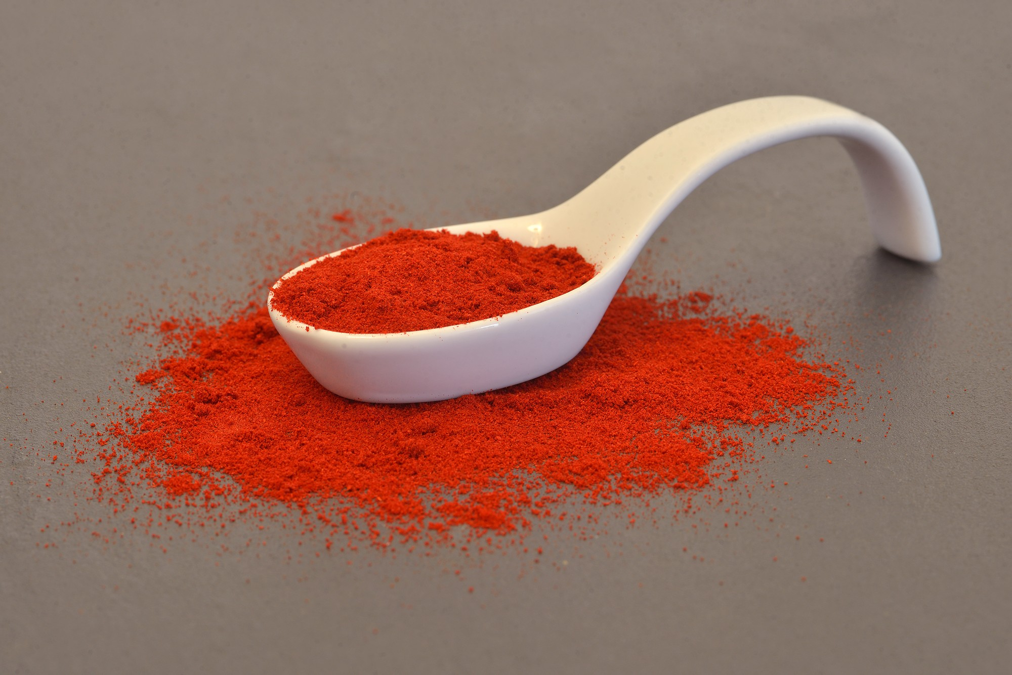 Pimentón ahumado de Candeleda. Se caracteriza por su color rojo intenso resultado de un pimentón libre pedúnculos y aceites añadidos.